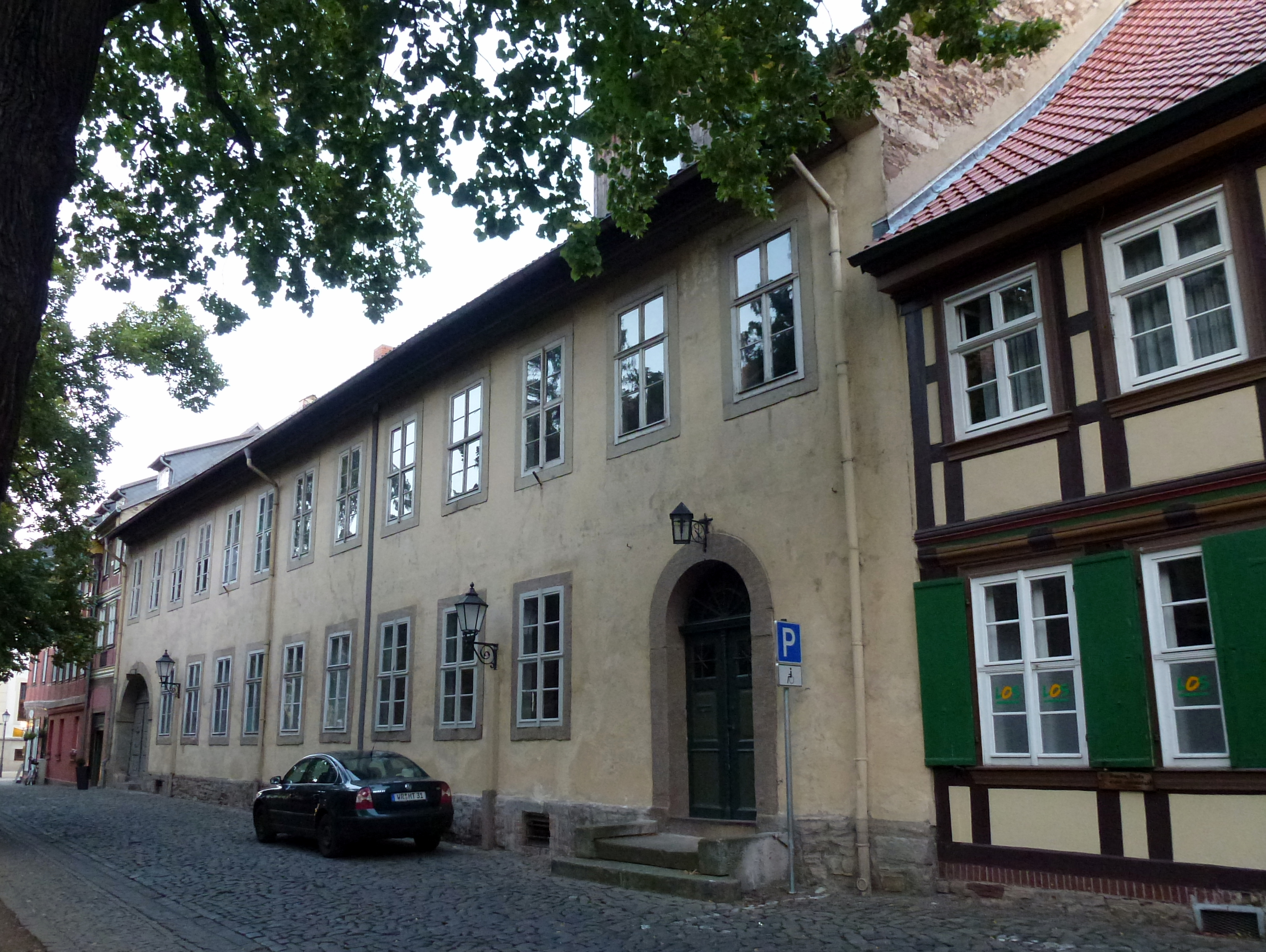 Ehemaliges Pfarrhaus am Liebfrauenkirchhof in Wernigerode, es wurde 1777 errichtet und bis 2010 von der Kirchengemeinde genutzt. Im Herbst 2015 diente es als Filmkulisse für den Film Frantz, der 2016 in die Kinos kommt.